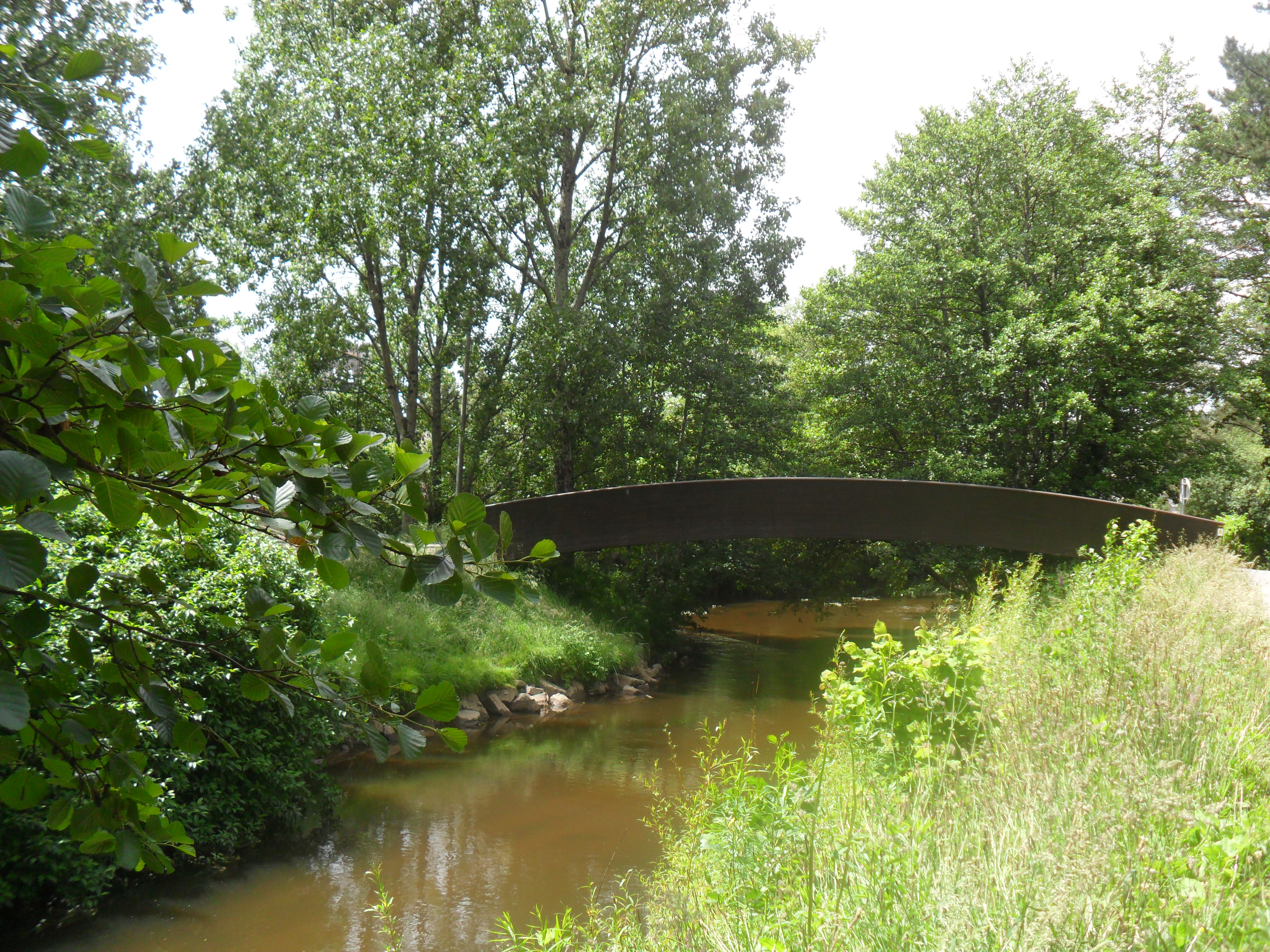 Le Steïr au Parc du Moulin Vert à Quimper (France)